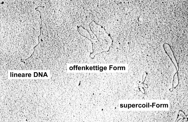 Plasmid-Präparation im Elektronenmikroskop